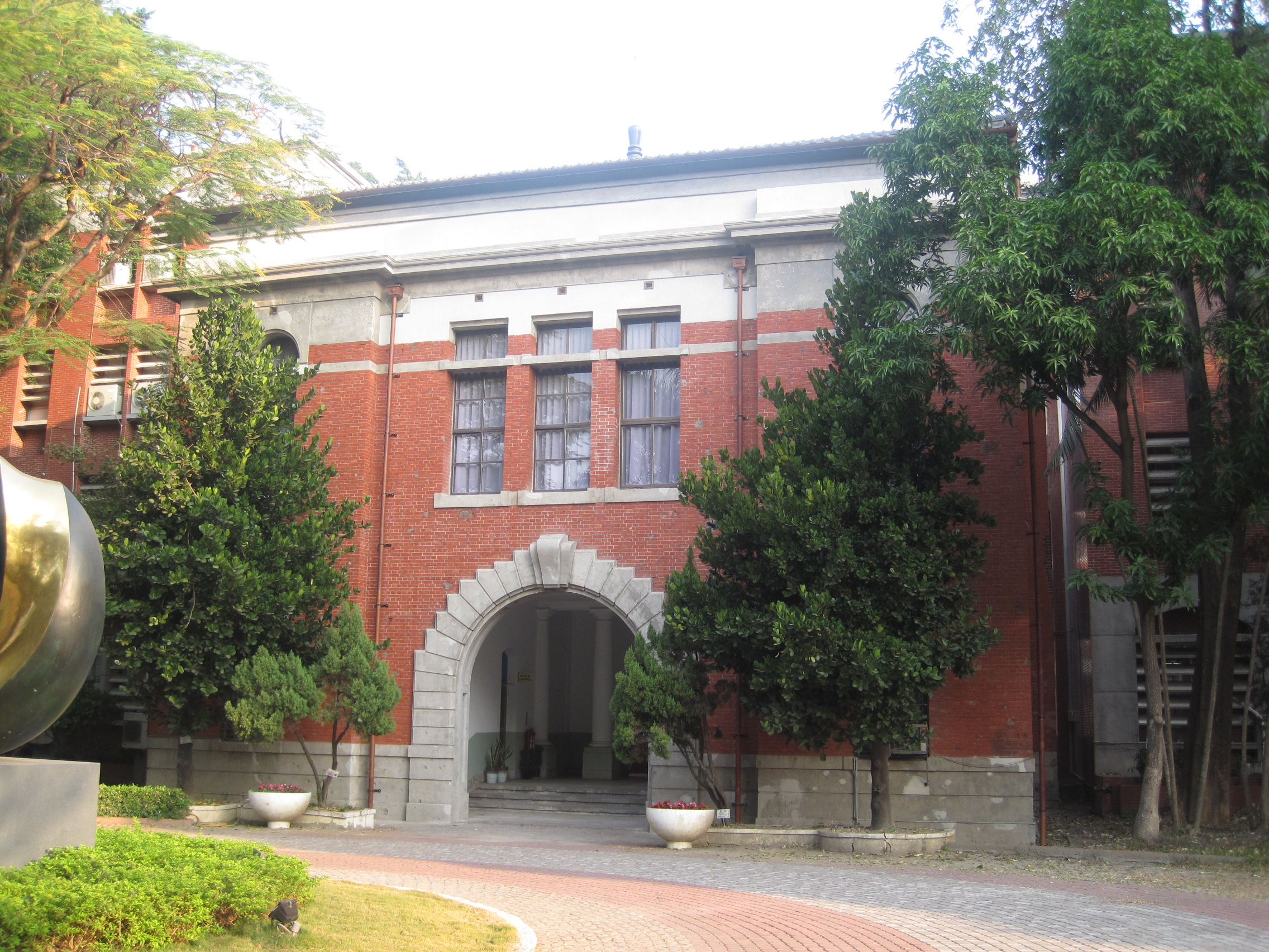 修改拱圈顏色後的玄關